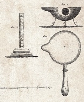 Иллюстрация отжигательницы из книги Захаров, Иван Семенович. Хозяин винокур, открывающий сведения, к устроению винных заводов и к производству винокурения относящияся. Писано в селе Преображенском, в Белоруссии, 1807 года В Санктпетербурге, Печатано в типографии Ивана Глазунова, 1808. Приводится по книге Родионов Б.В. История русской водки от полугара до наших дней.